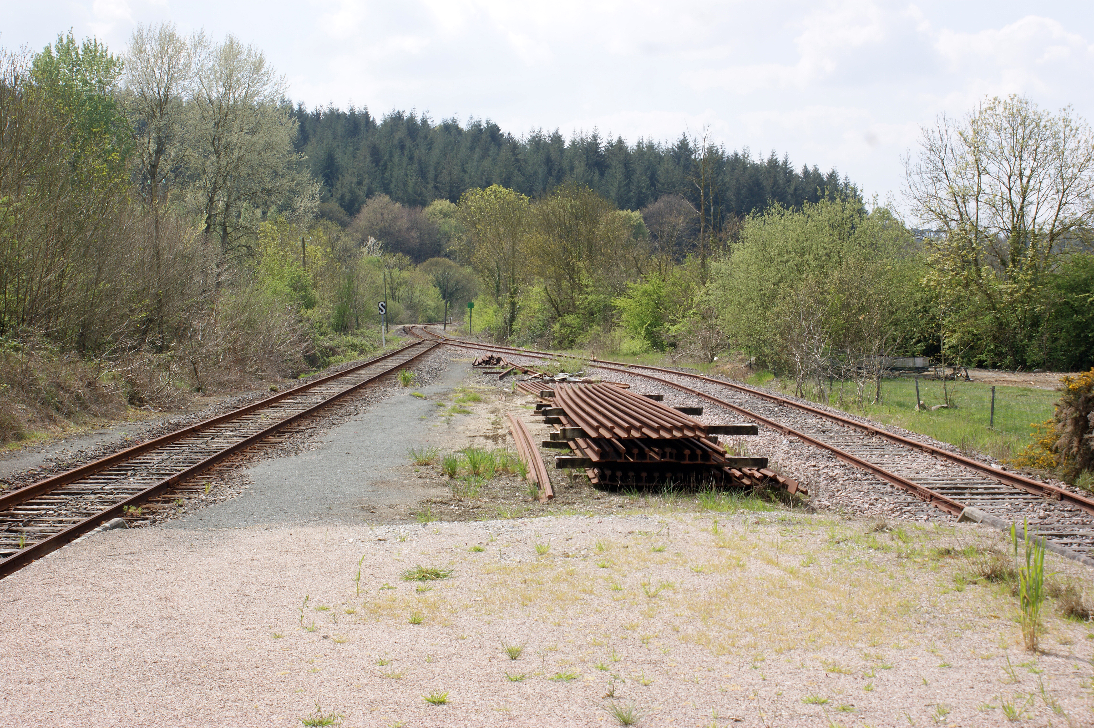 Gare de Carnoët - Locarn, vers Carhaix l'extrémité du quai central, la ligne et la voie de croisement.